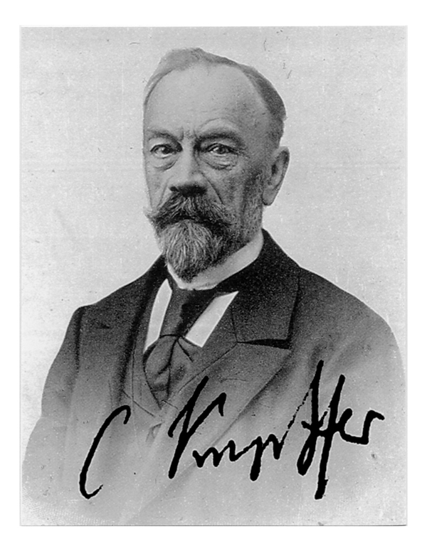 Karl Wilhelm von Kupffer, PD, Quelle: Internet / Archiv mikro. Anatomie, 1903